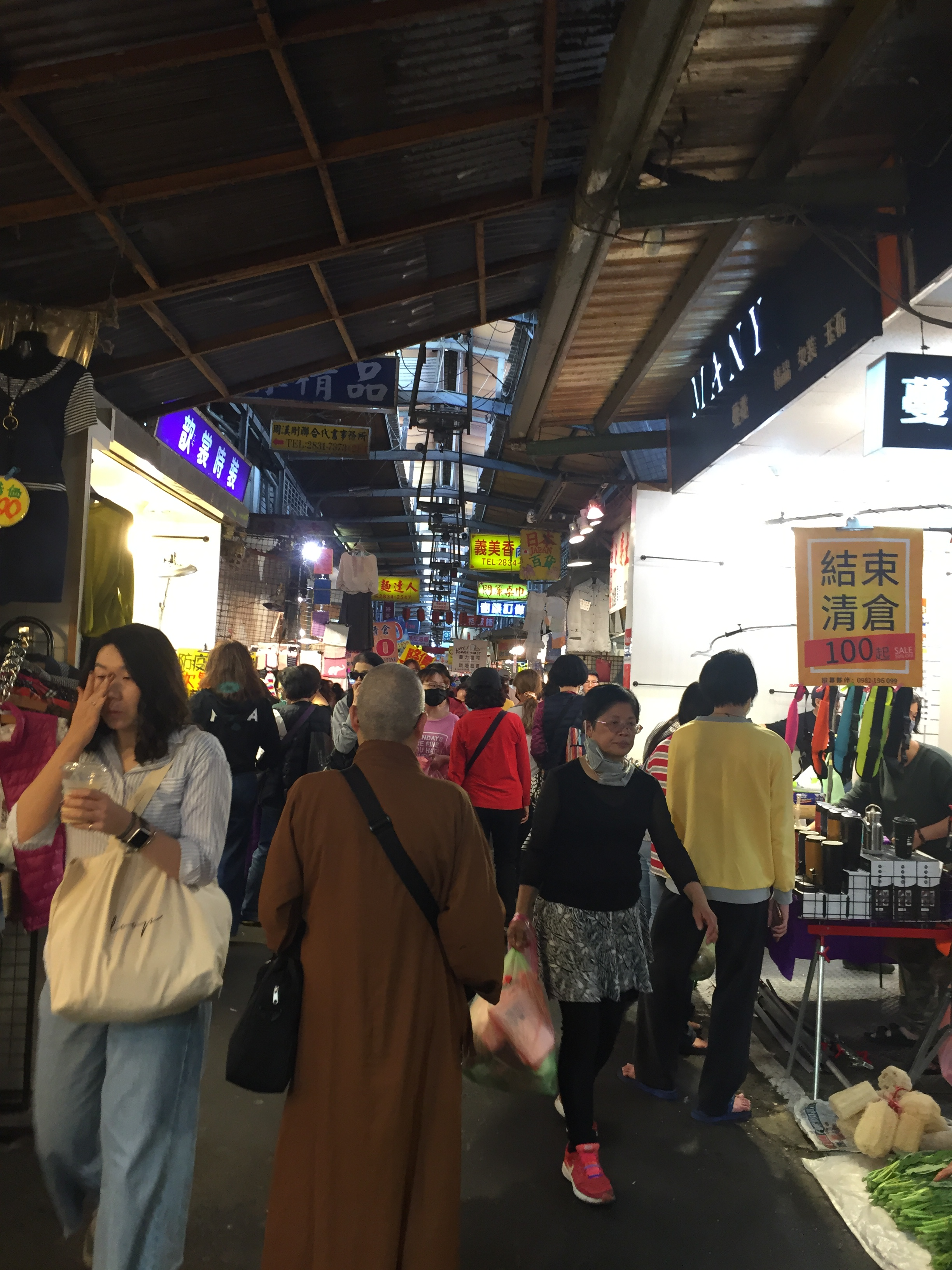 台灣台北市士林區華榮街華榮市場街景